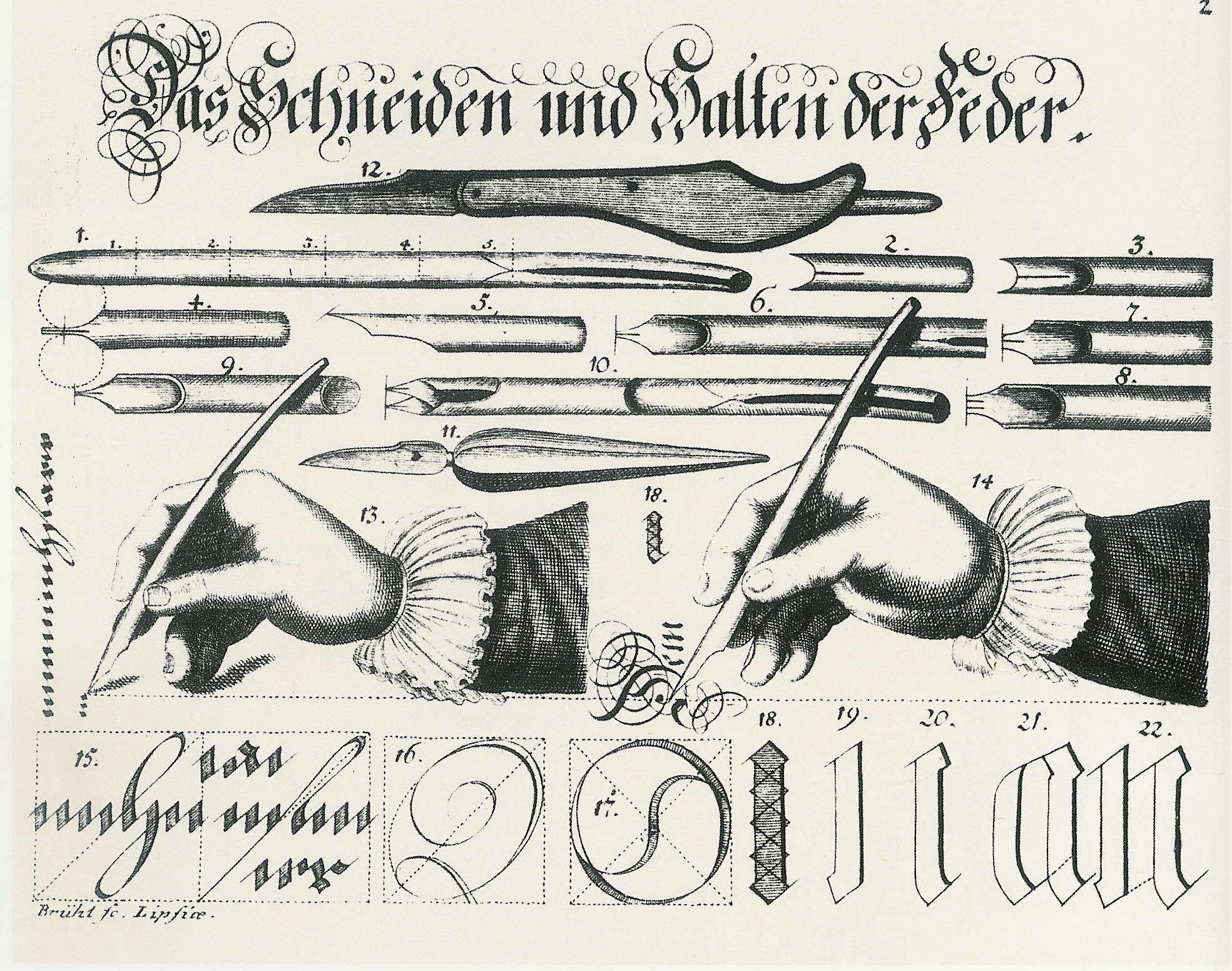 "Das Schneiden und Halten der Feder" aus: Johann Stäps: Selbstlehrende Canzleymäßige Schreibe-Kunst. Leipzig 1784 "Cutting and Holding the Feather" from: Johann Stäps: Selbstlehrende Canzleymäßige Schreibe-Kunst. Leipzig 1784